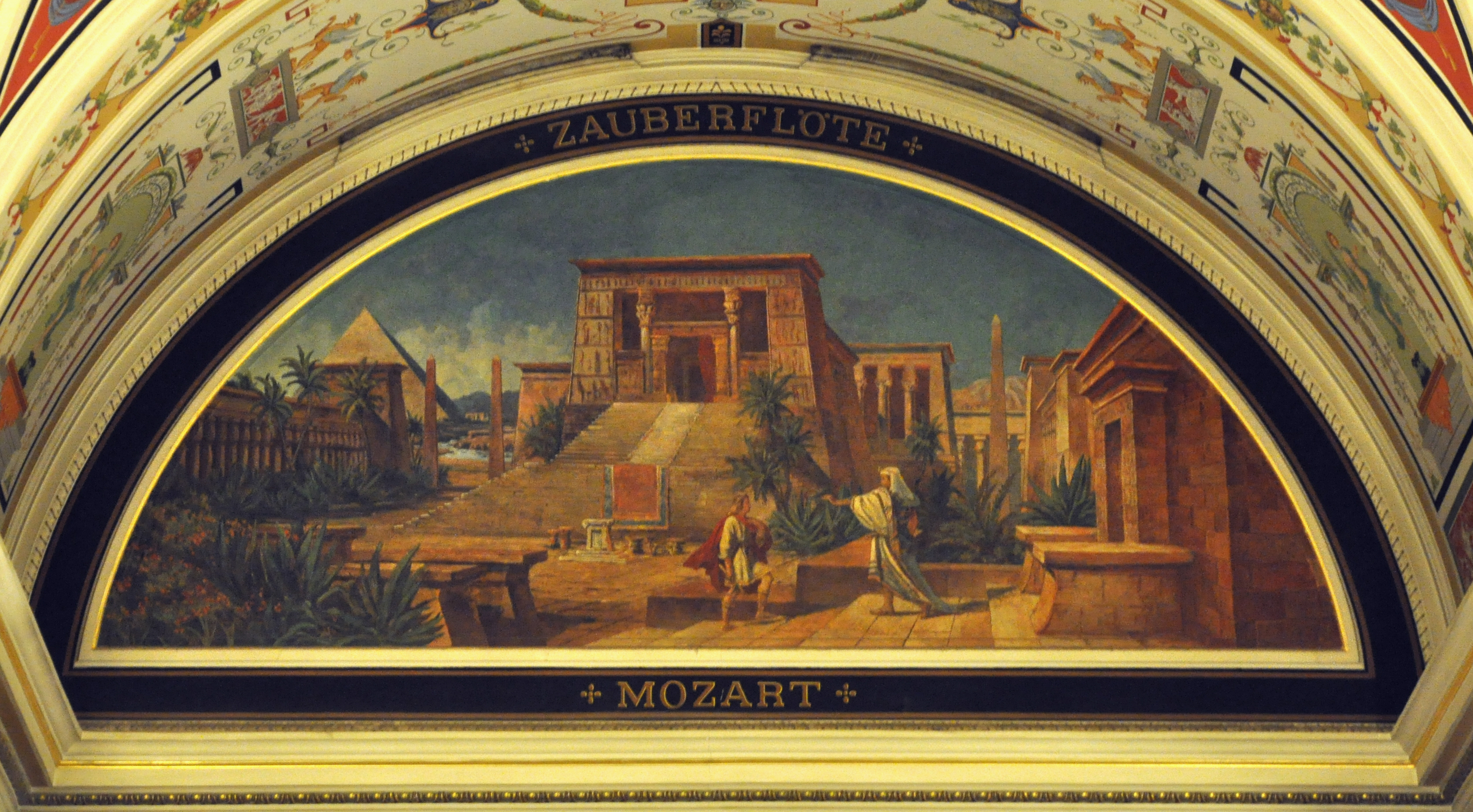 Dresden, Semperoper, Foyer, Gemälde: Die Zauberflöte von Mozart